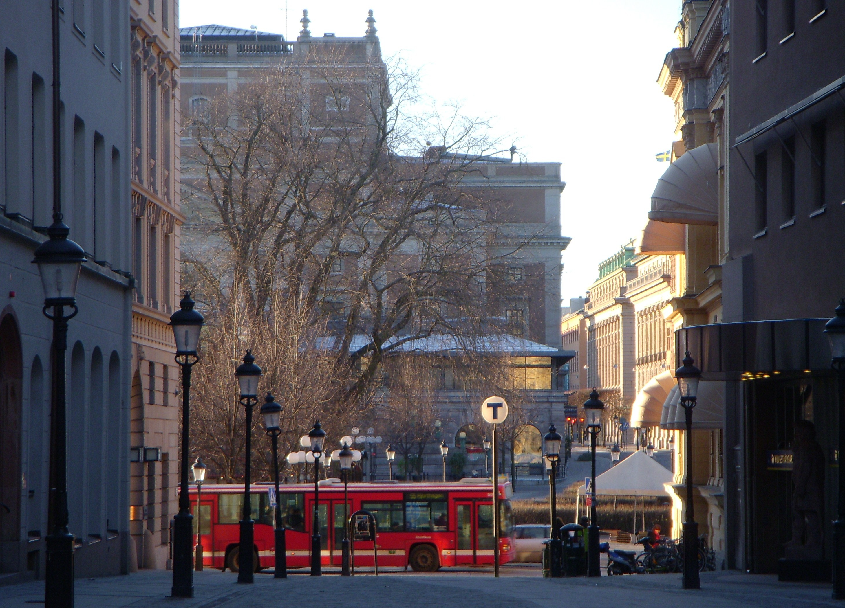 Arsenalsgatan, Blasieholmen, Stockholm